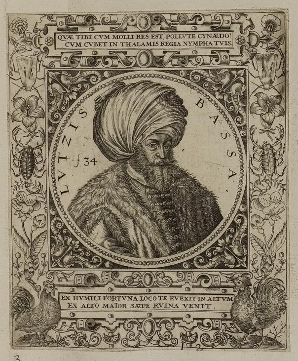 Grafik aus dem Klebeband Nr. 1 der Fürstlich Waldeckschen Hofbibliothek Arolsen Illustration aus: Georg Greblinger: Wahre Abbildungen der Türckischen Kayser vnd Persischen Fürsten / so wol auch anderer Helden und Heldinnen von dem Osman / biß auf den andern Mahomet. Johann Ammon, Frankfurt 1648 Motiv: "Lutzis Bassa" (Lütfi Pasha)